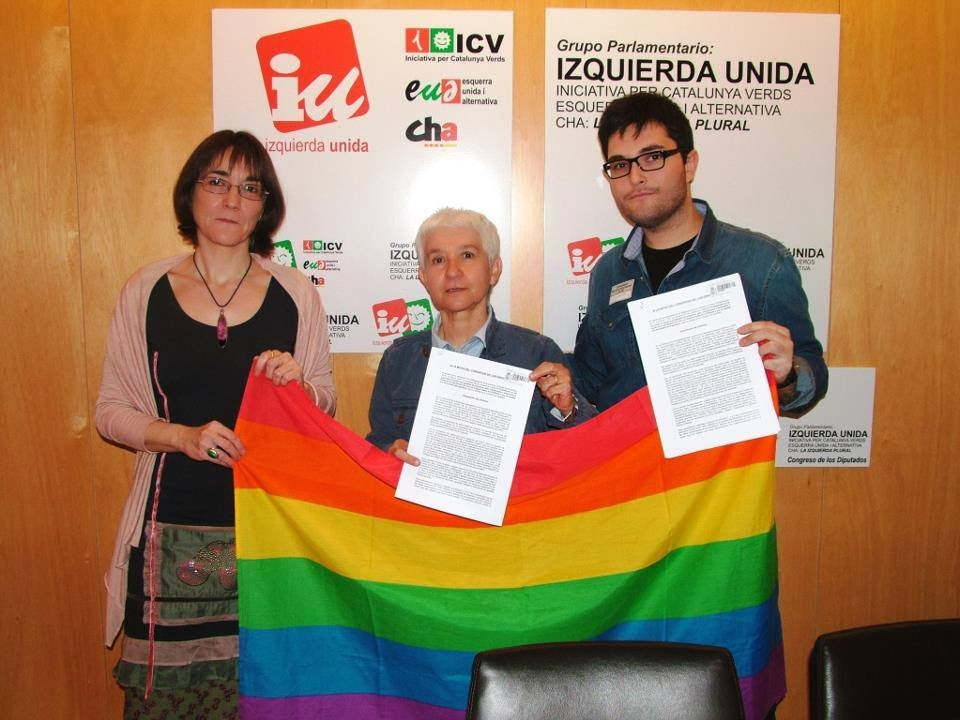 Mayo.